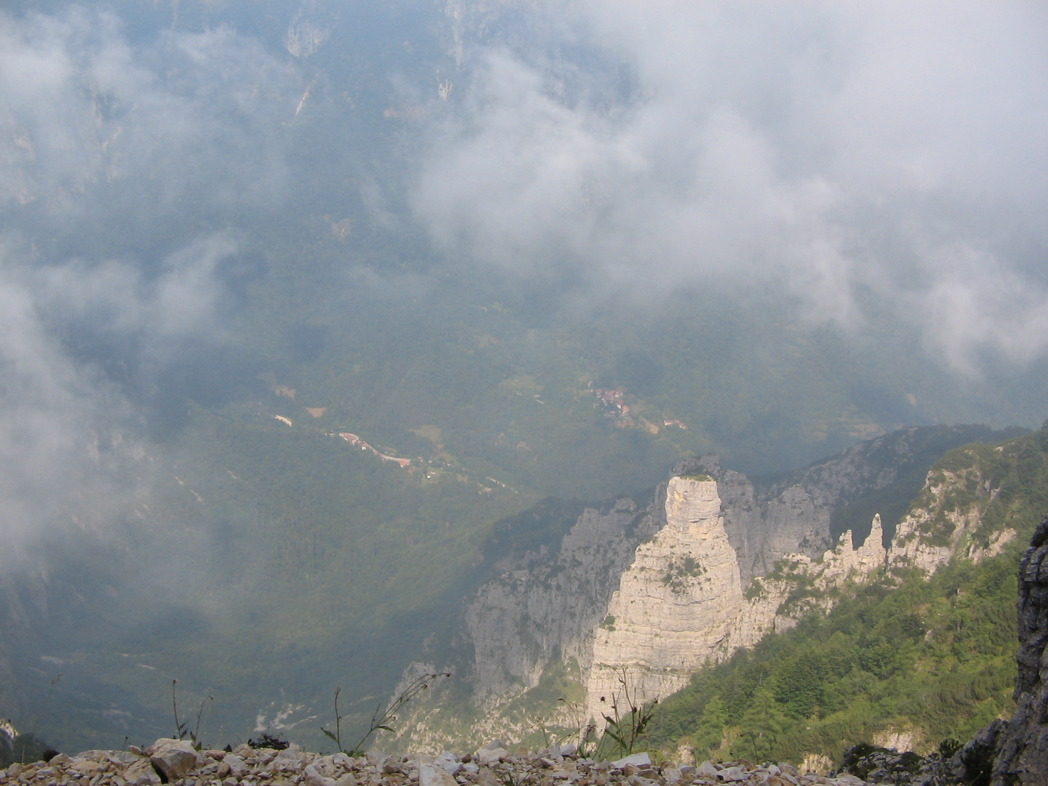 Val Posina saught from Strada dei Scarubi,Pasubio